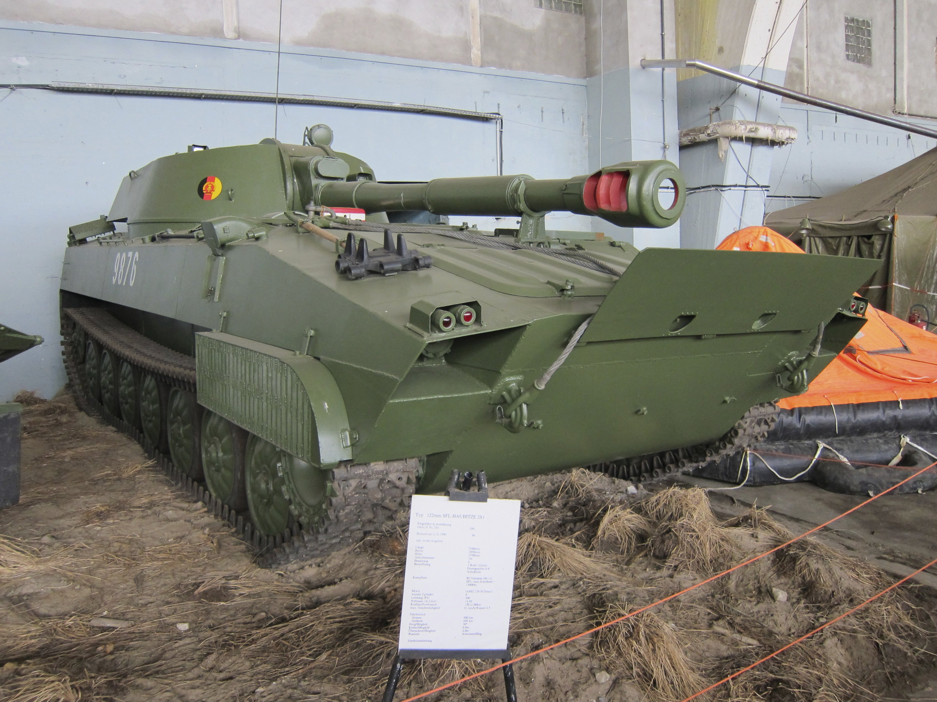 Technik Museum Pütnitz